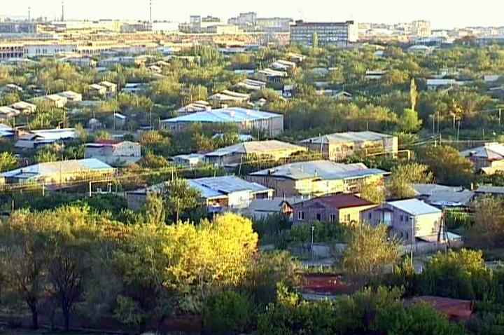 տեսարան Զովունի գյուղից